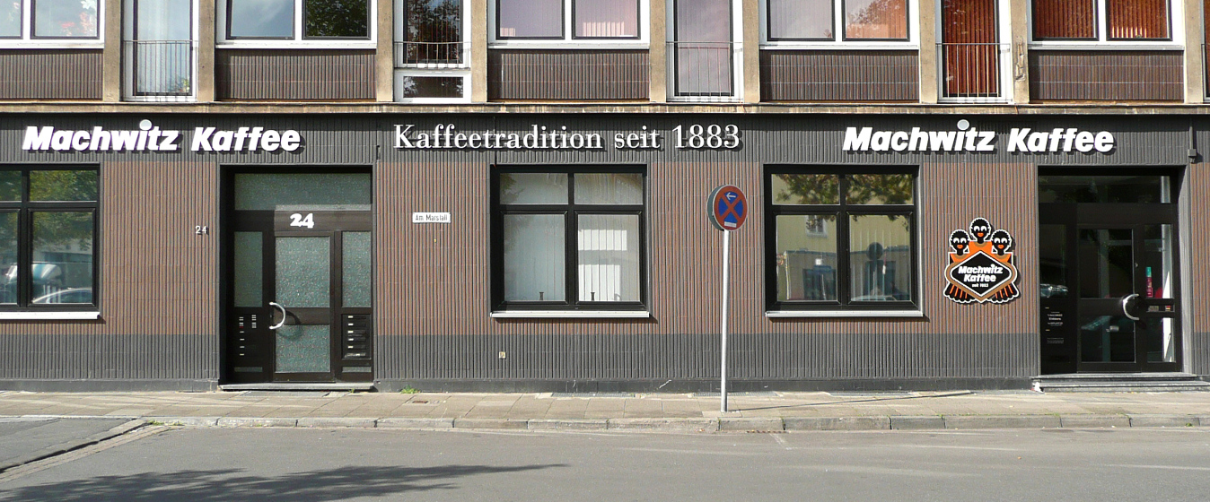 Firmensitz Machwitz Kaffee